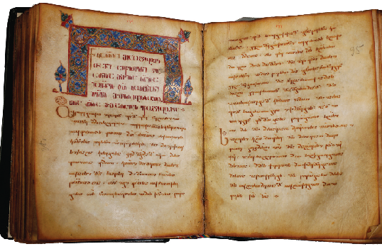 მცირე სჯულისკანონი